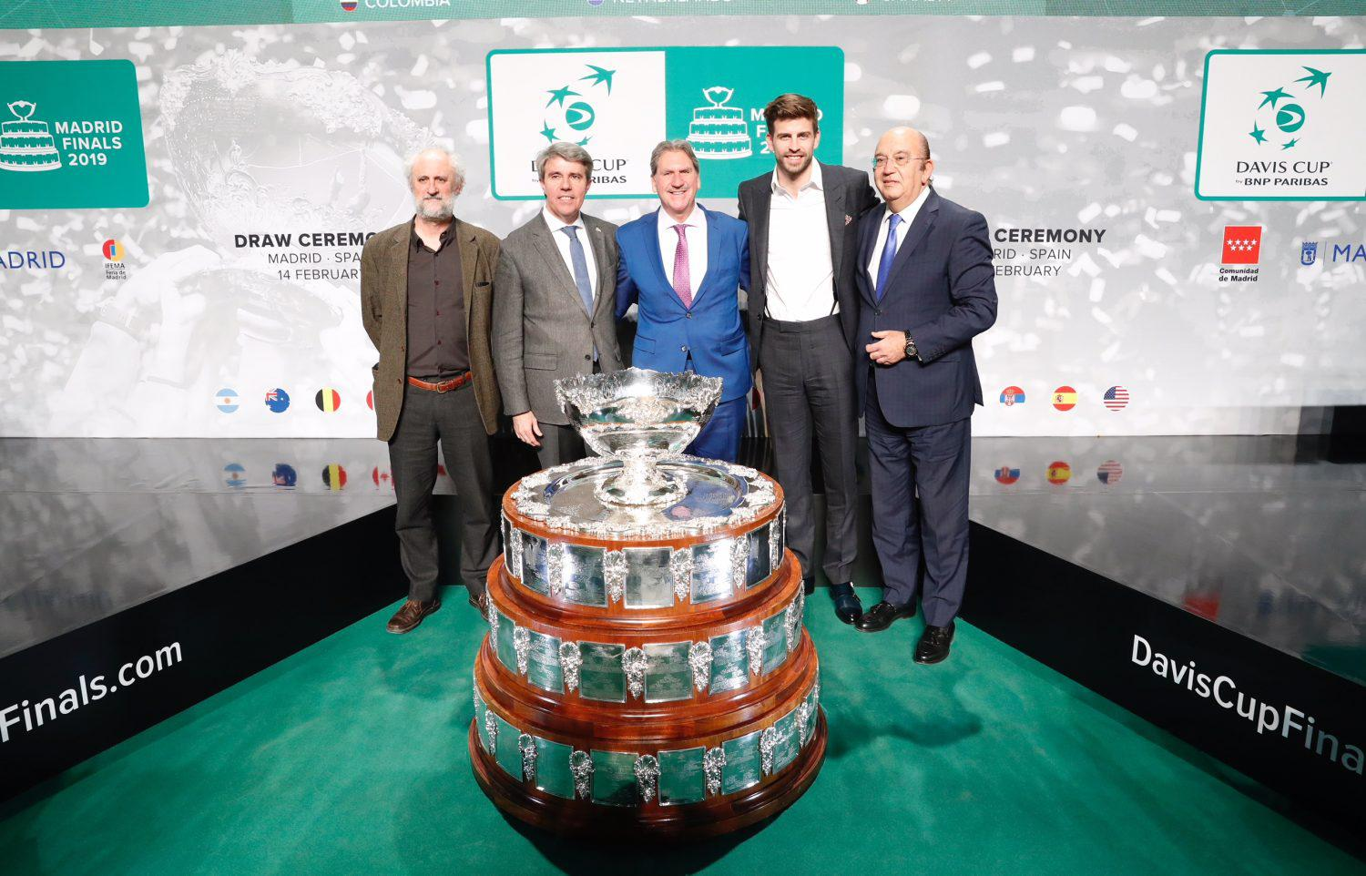 El coordinador general de Alcaldía, Luis Cueto, se ha mostrado hoy satisfecho en el sorteo de la fase final de la Copa Davis de que la ciudad de Madrid sea anfitriona de este evento: “Cuando la final cambie de ciudad, diremos que todo empezó en Madrid y estamos muy honrados de que así sea”.